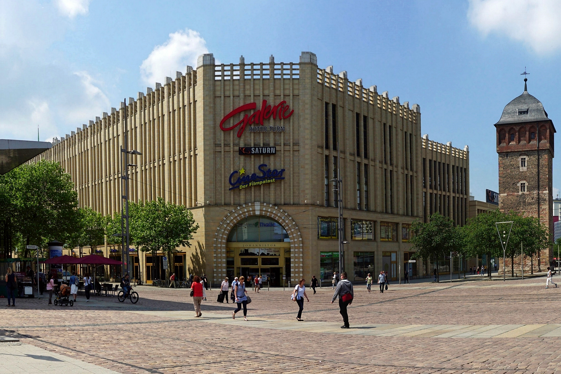 Die Galerie Roter Turm und ihr Namensgeber im Jahr 2016